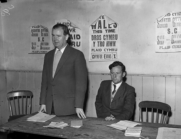 Teitl Cymraeg/Welsh title: Etholiad 1959 ym Meirion. Ffotograffydd/Photographer: Geoff Charles (1909-2002) Nodyn/Note: Gwynfor Evans (Plaid Cymru) talking at Bryncrug. Dyddiad/Date: October 1, 1959 Cyfrwng/Medium: Negydd ffilm / Film negative Cyfeiriad/Reference: (gch20976) Rhif cofnod / Record no.: 3470389 Rhagor o wybodaeth am gasgliad Geoff Charles yn Llyfrgell Genedlaethol Cymru More information about the Geoff Charles Collection at the National Library of Wales